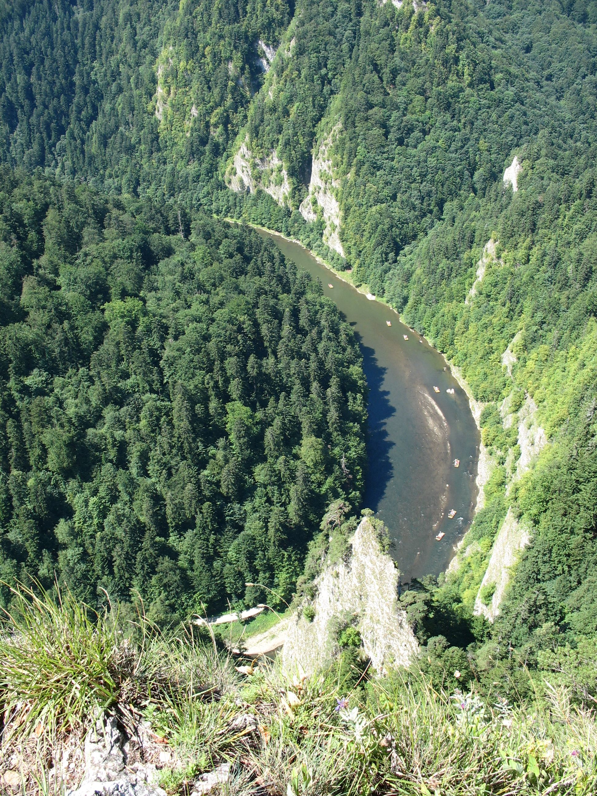 Przełom Dunajca - Widok z Sokolicy